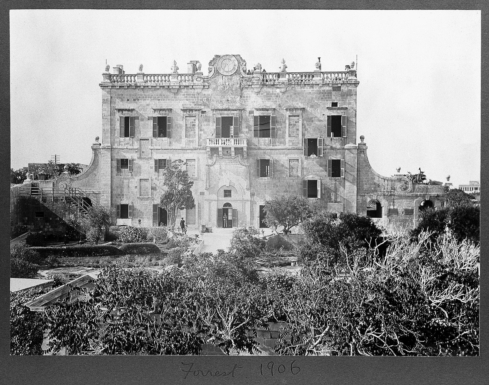 Forest Hospital, Malta 1906. Archives & Manuscripts